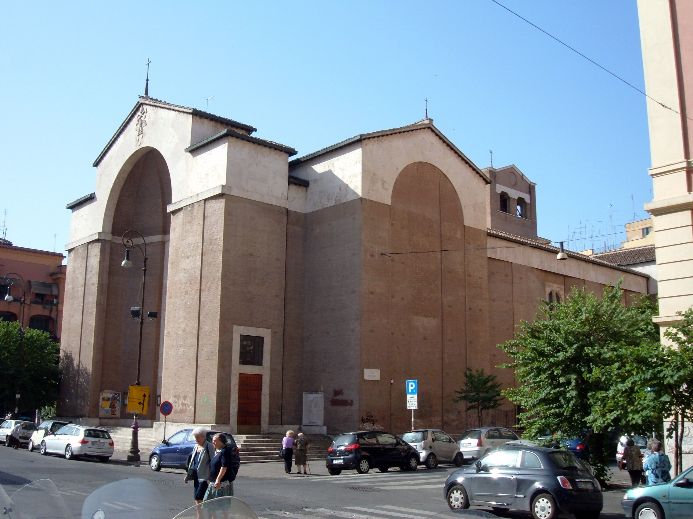 Chiesa di San Saturnino, a Roma, nel quartiere Trieste.